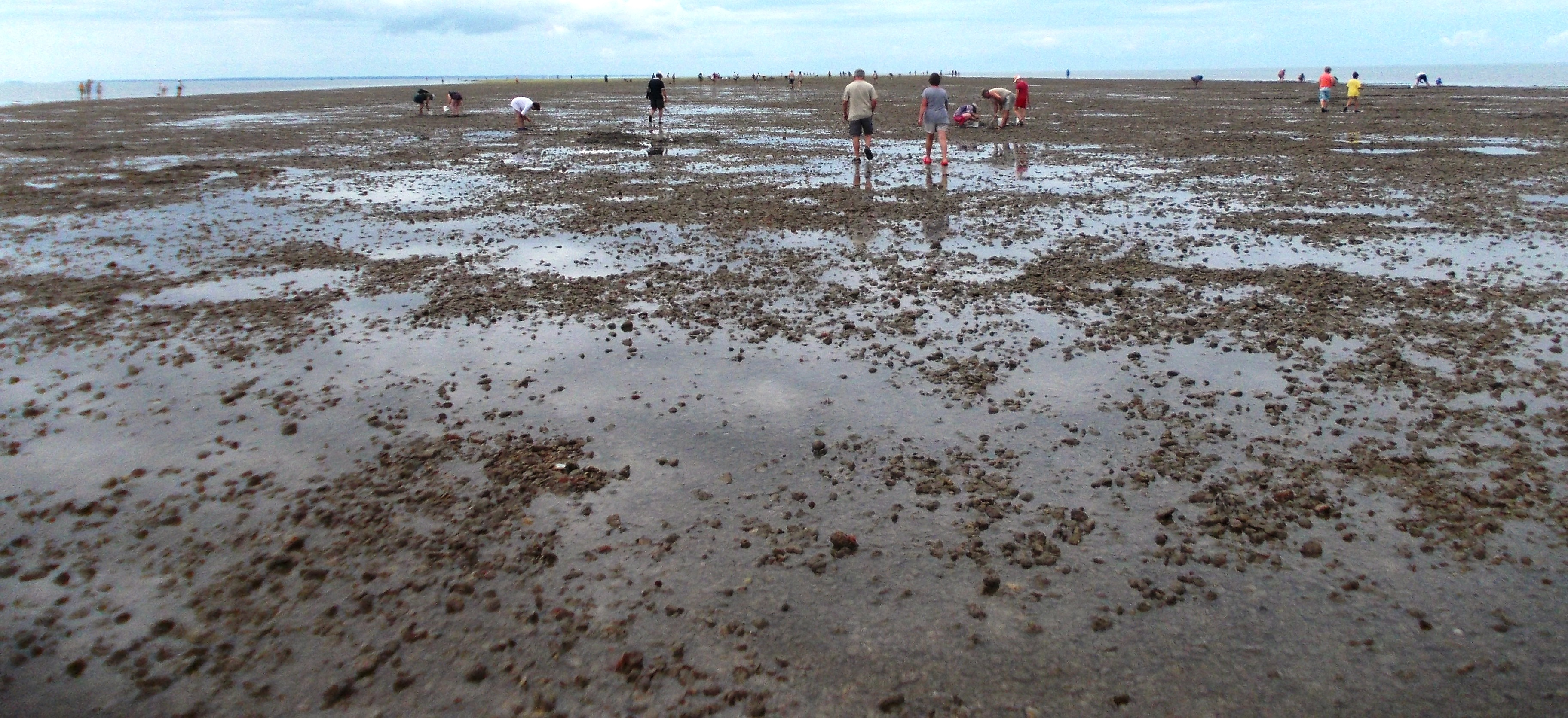 Fin de la marée basse (coefficient de marée 107), le Pont d'Yeu est découvert peu à peu. L'Ile d'Yeu est en vue au loin a gauche.